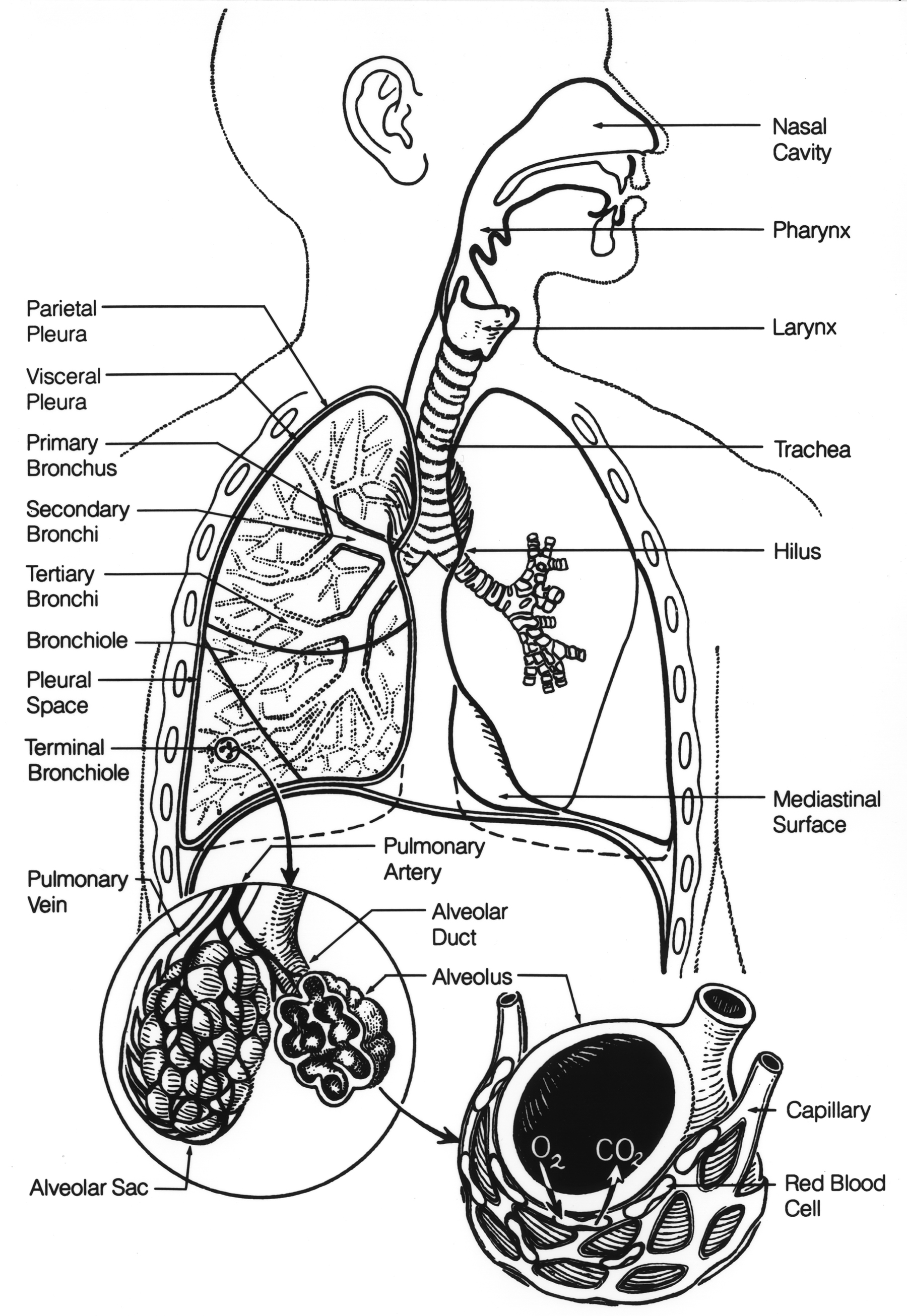 Systeme respiratoire